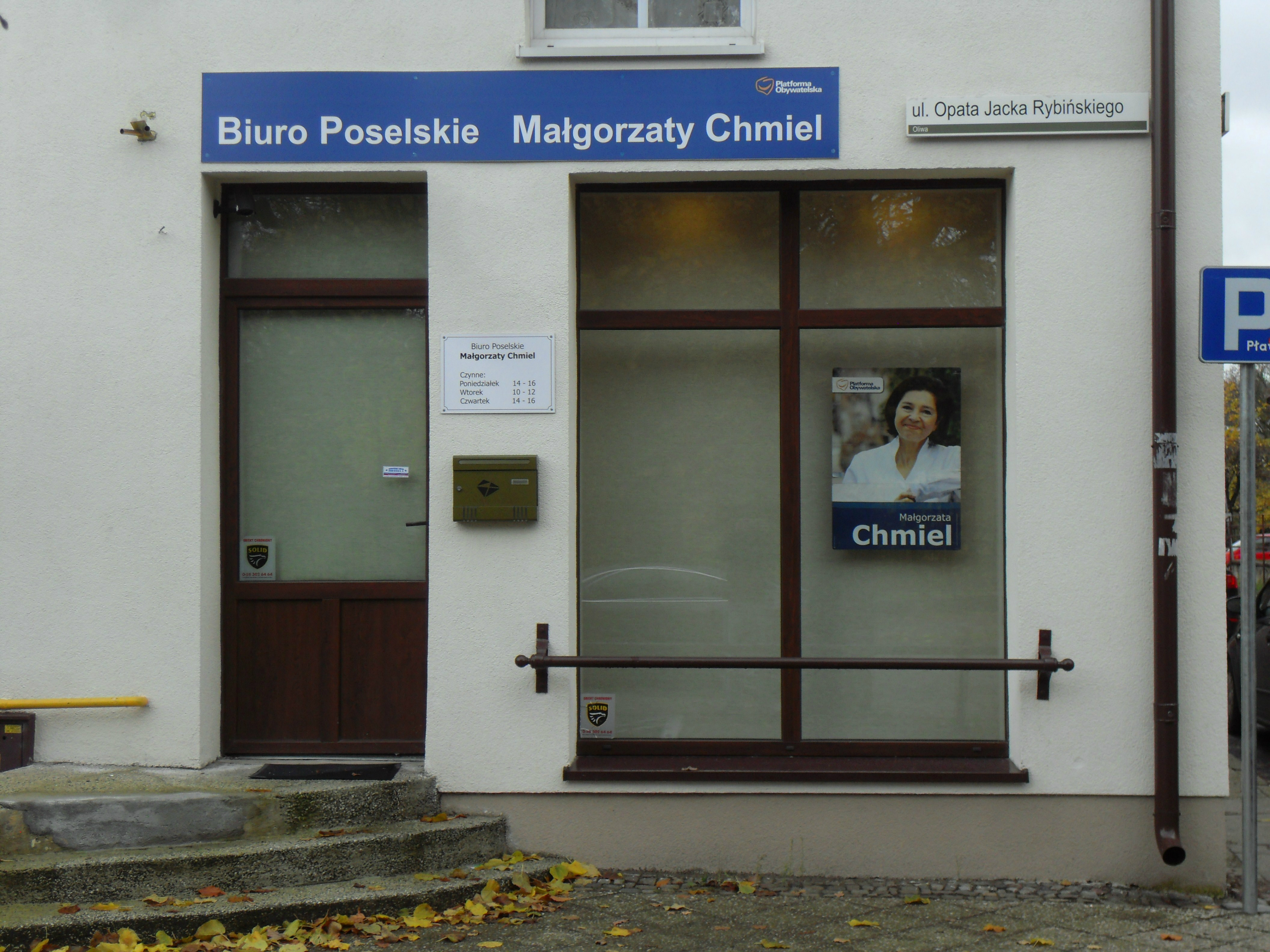 Gdańsk Oliwa, ul. Rybińskiego 23. Biuro poselskie Małgorzaty Chmiel.